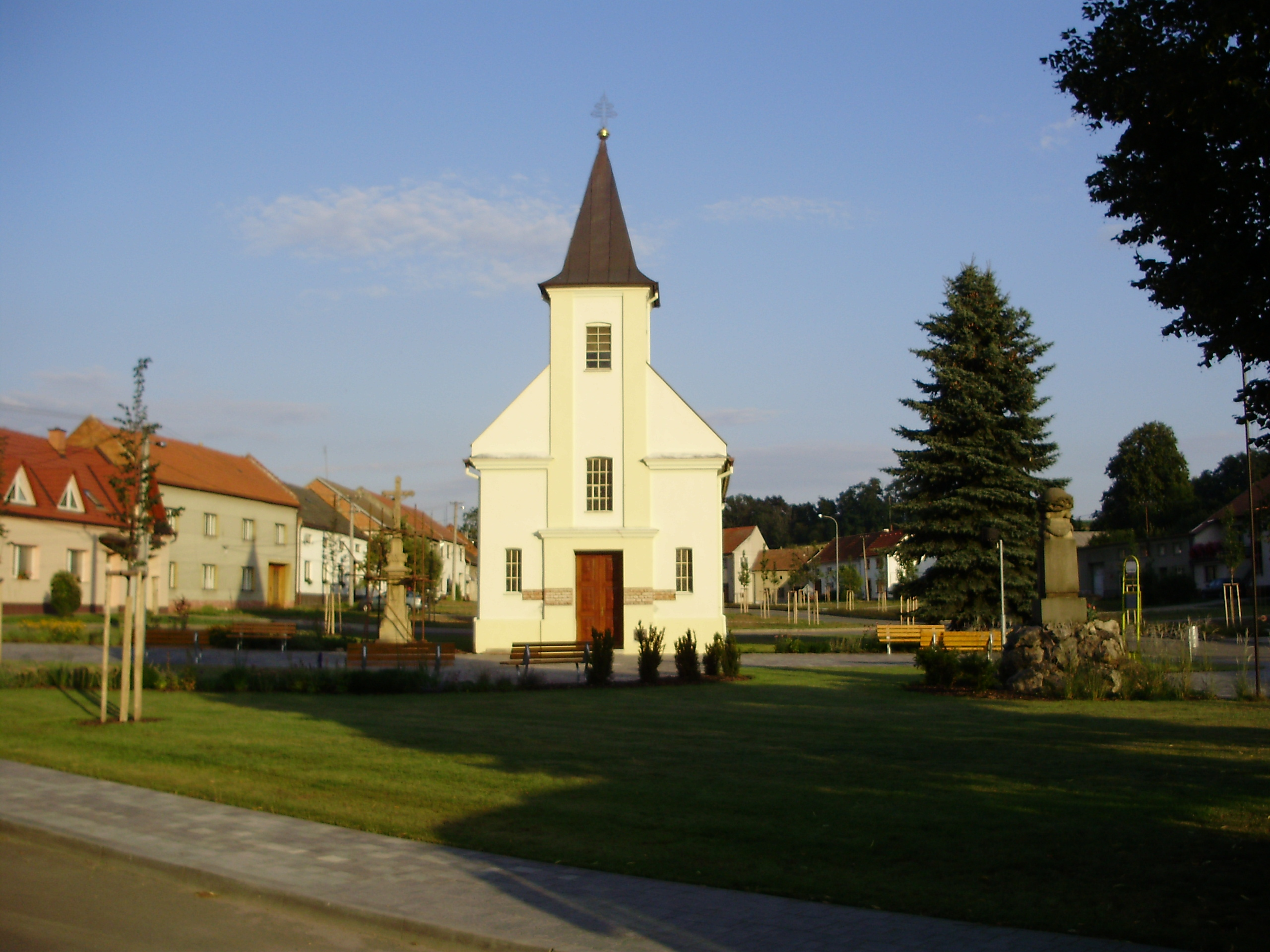 Dobrochov náves